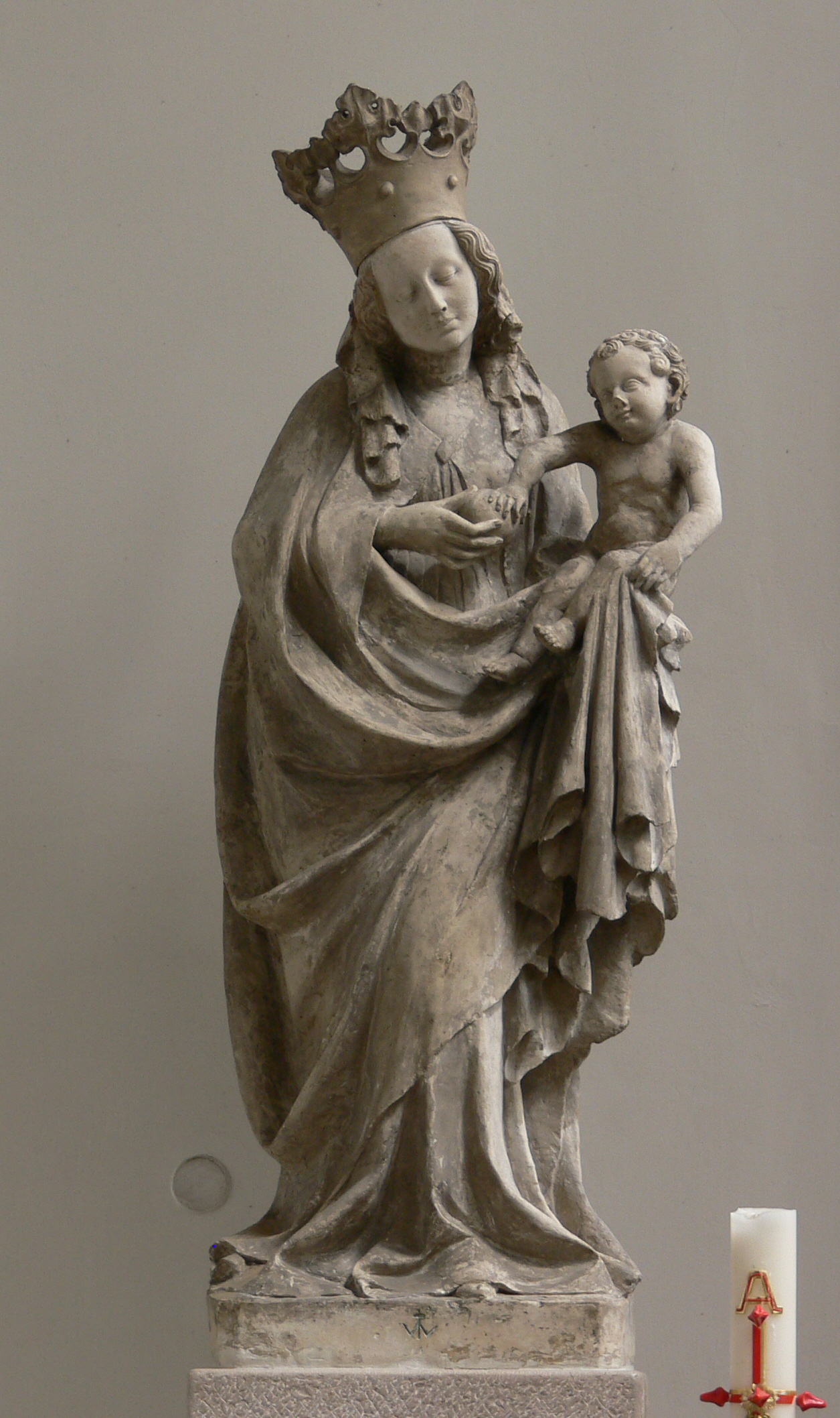 Stiftskirche Heilig Kreuz, Horb am Neckar Horber Madonna, wohl 1400-1410, Kalkstein, 1,16 m hoch, Reste alter Fassung, Hände/Füßchen teilweise ergänzt